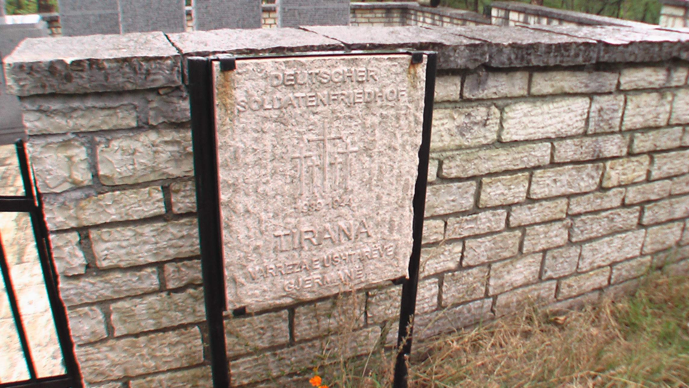 Tirana: Deutscher Soldatenfriedhof, Schild